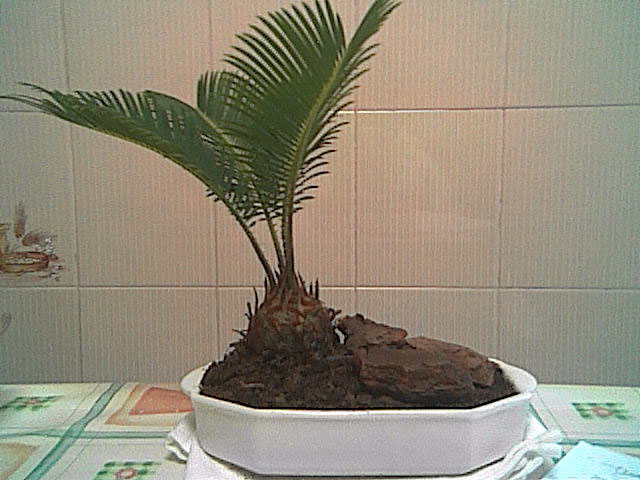 Fotografía de una Cycas revoluta joven.